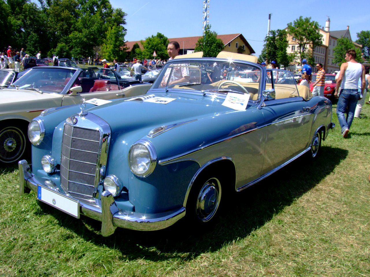 Mercedes Benz 220S Ponton Cabrio 1958 Baujahr: 1958 2180 ccm 78 kw